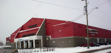 Aréna Jacques-Laperrière, Rouyn-Noranda, ville du Québec (Canada), de la région administrative de l'Abitibi-Témiscamingue